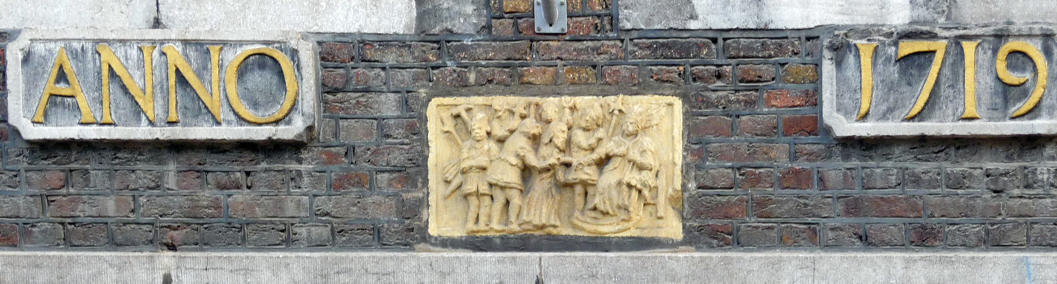 Rijksmonument in Maastricht. Boschstraat.